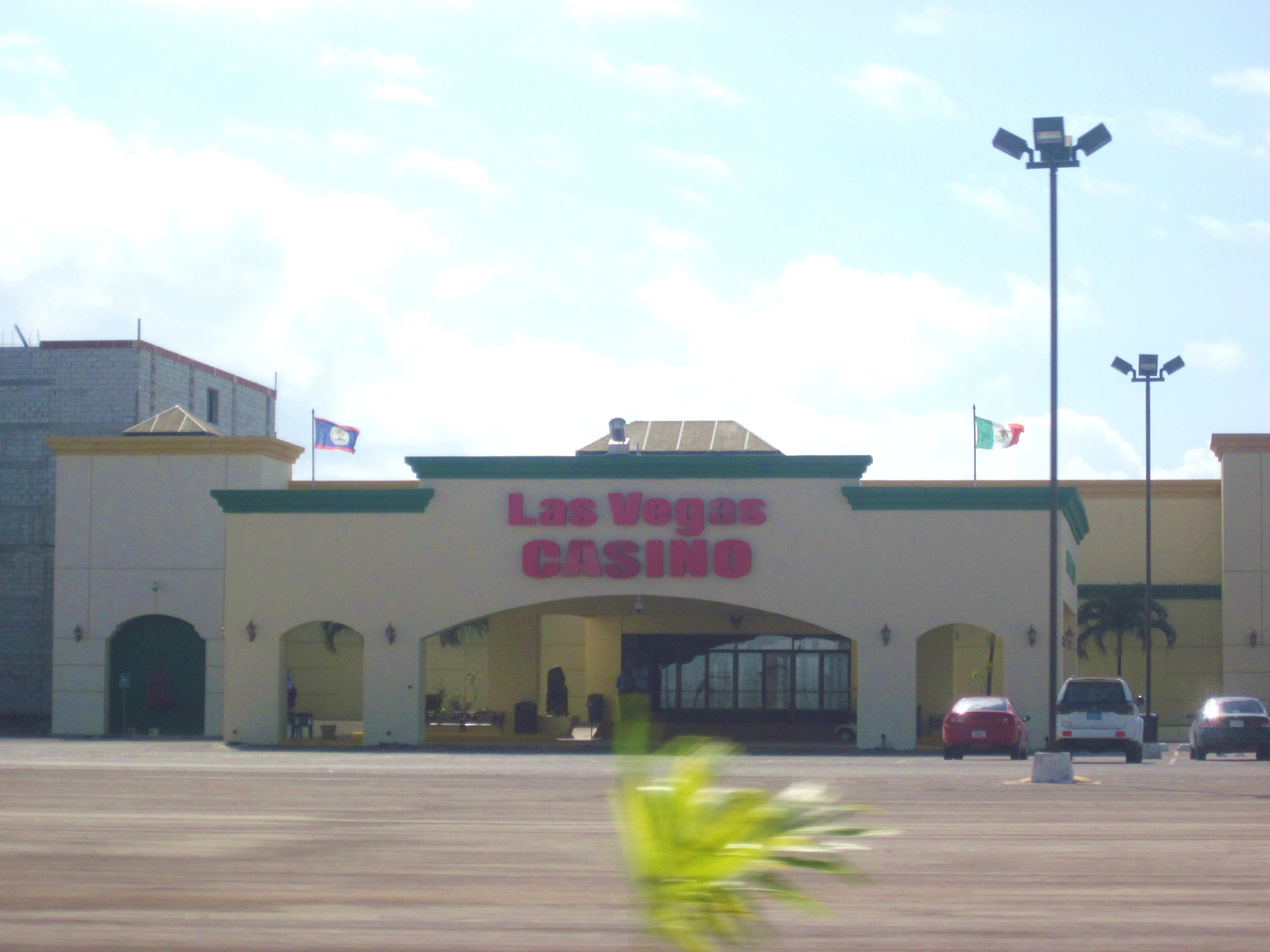 Casino Las Vegas, Zona Libre.